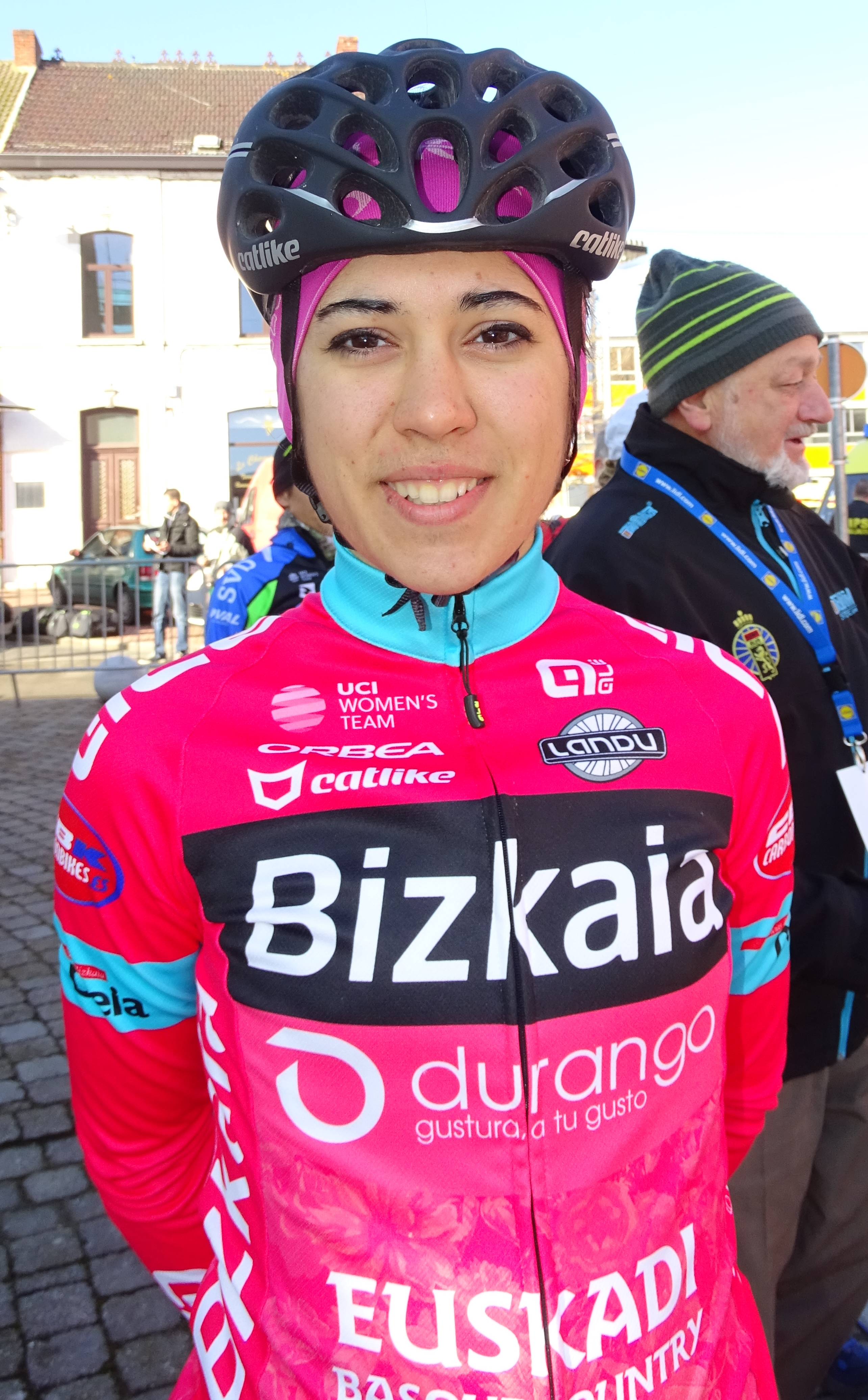 Reportage réalisé le mercredi 2 mars à l'occasion du départ du Samyn des Dames 2016 et du Samyn 2016 à Quaregnon, Belgique.